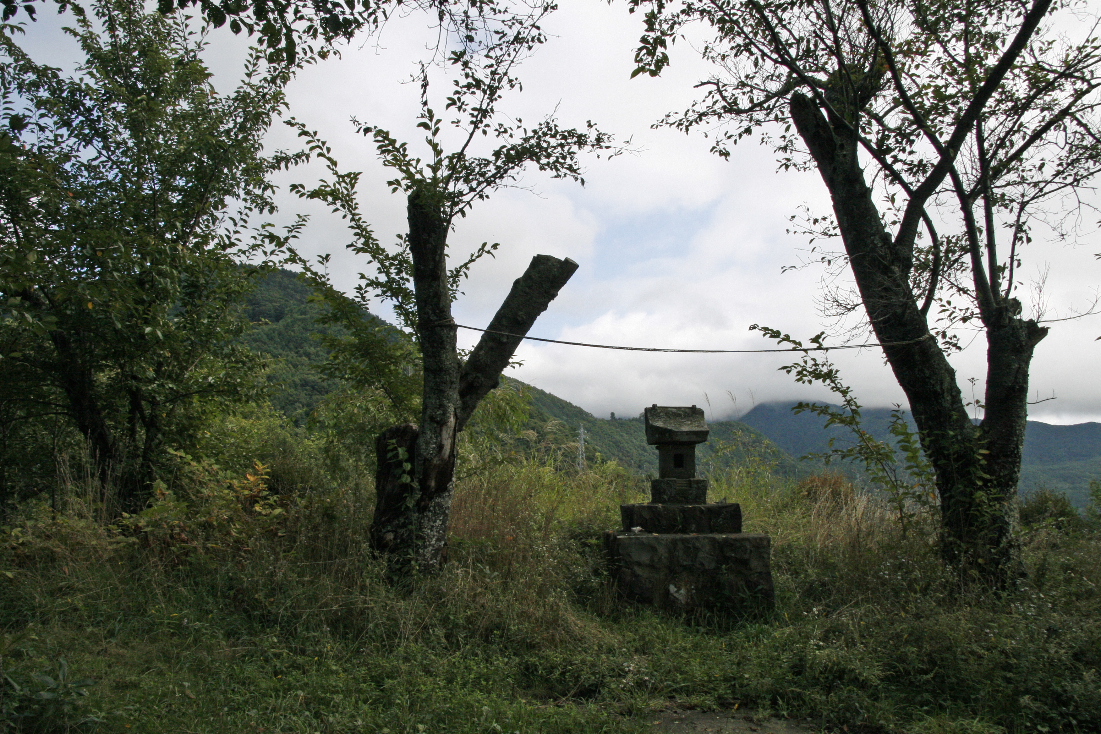 葛尾城主郭部